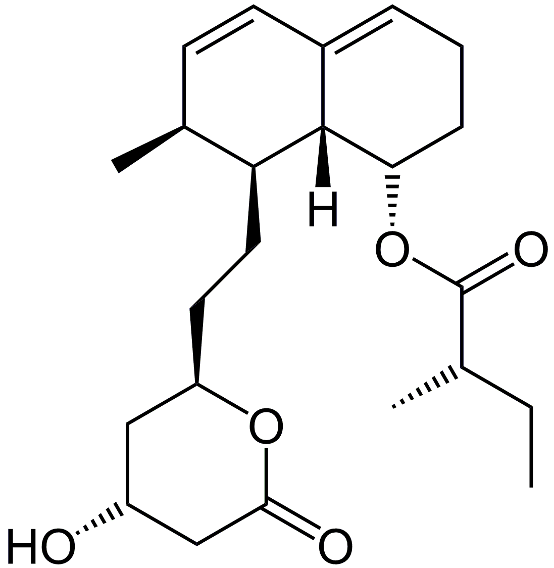 Mevastatin